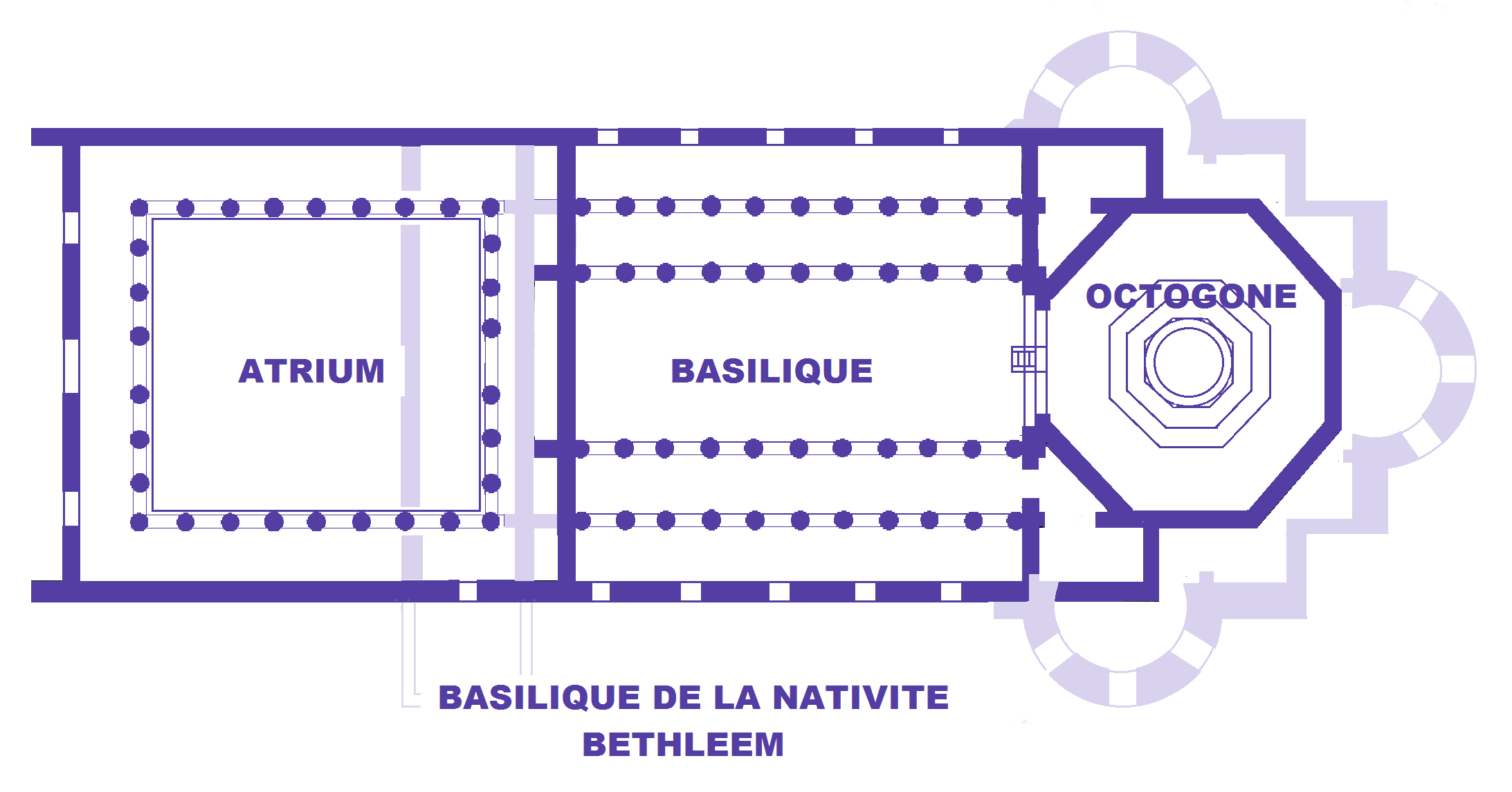 Bethléem, plan de la basilique de la Nativité au IVe siècle